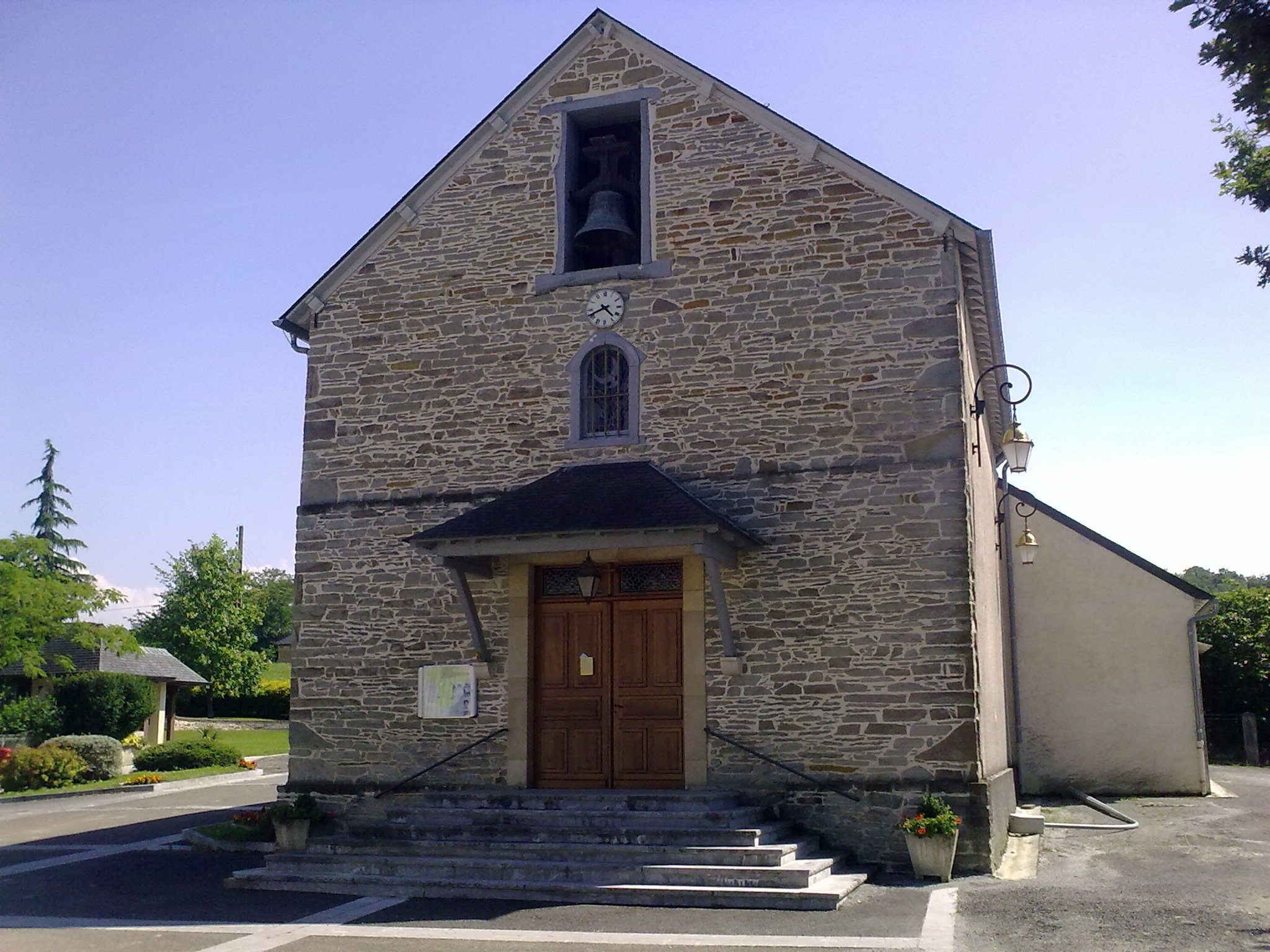 Eglise de Haut-de-Bosdarros.